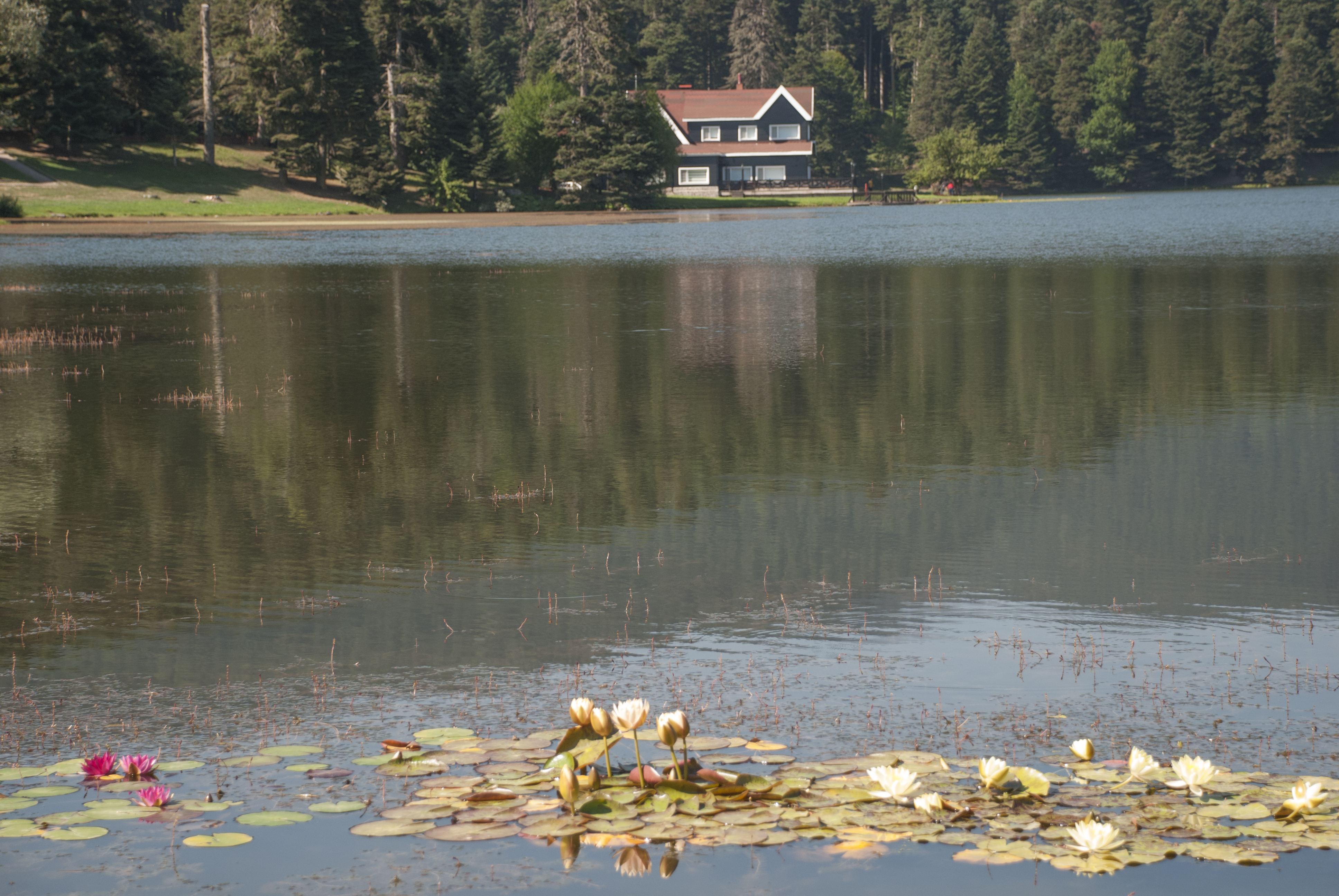 Gölcük Gölü, Bolu